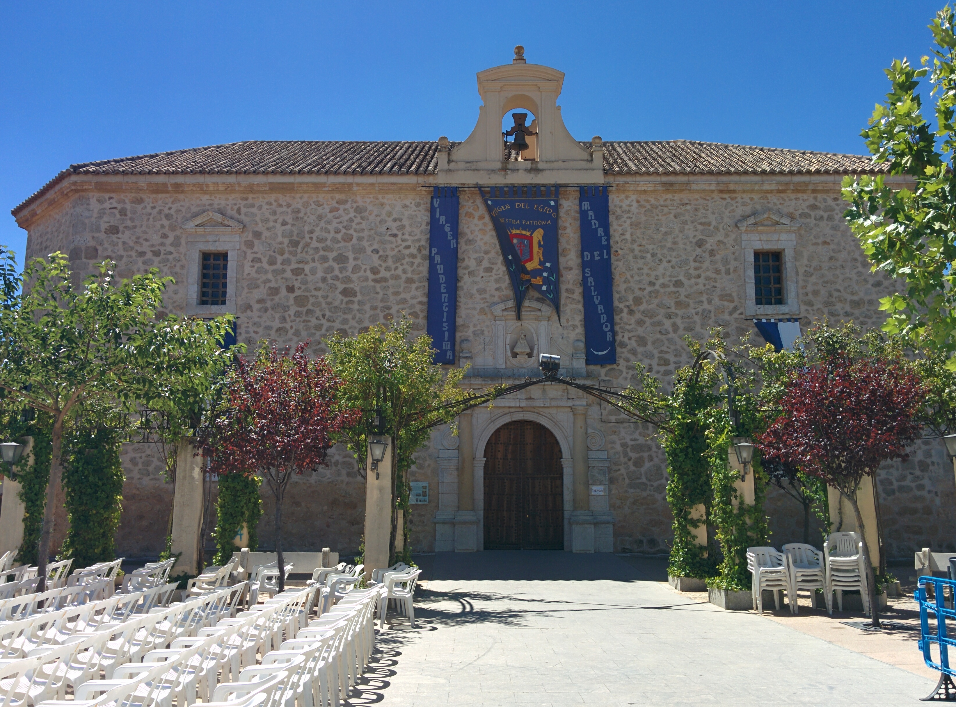 Ermita de Nuestra Señora del Egido, en La Puebla de Almoradiel (Toledo, España).